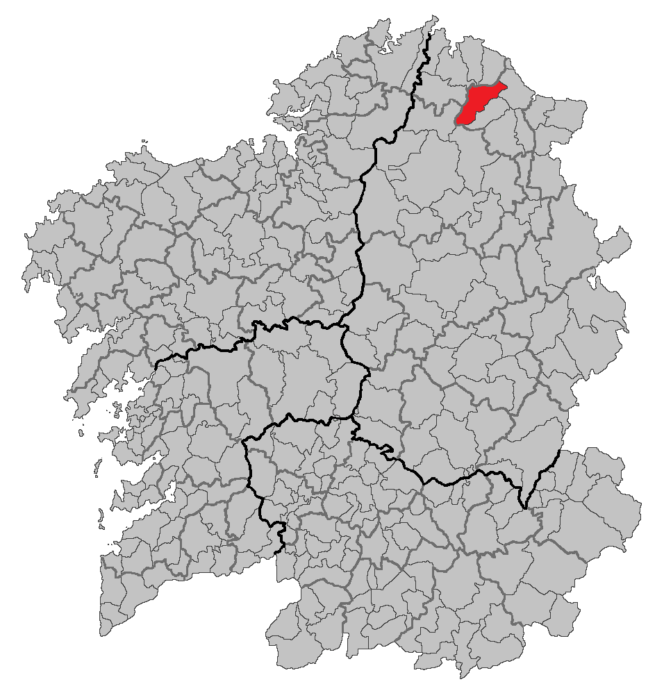 Mapa coa localización do concello de O Valadouro.